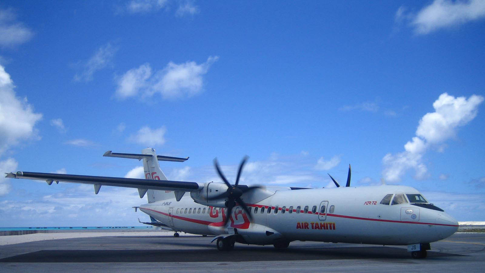 ATR d'Air Tahiti à Totegegie (Photo personnel 2006) Utilisateur:FRED